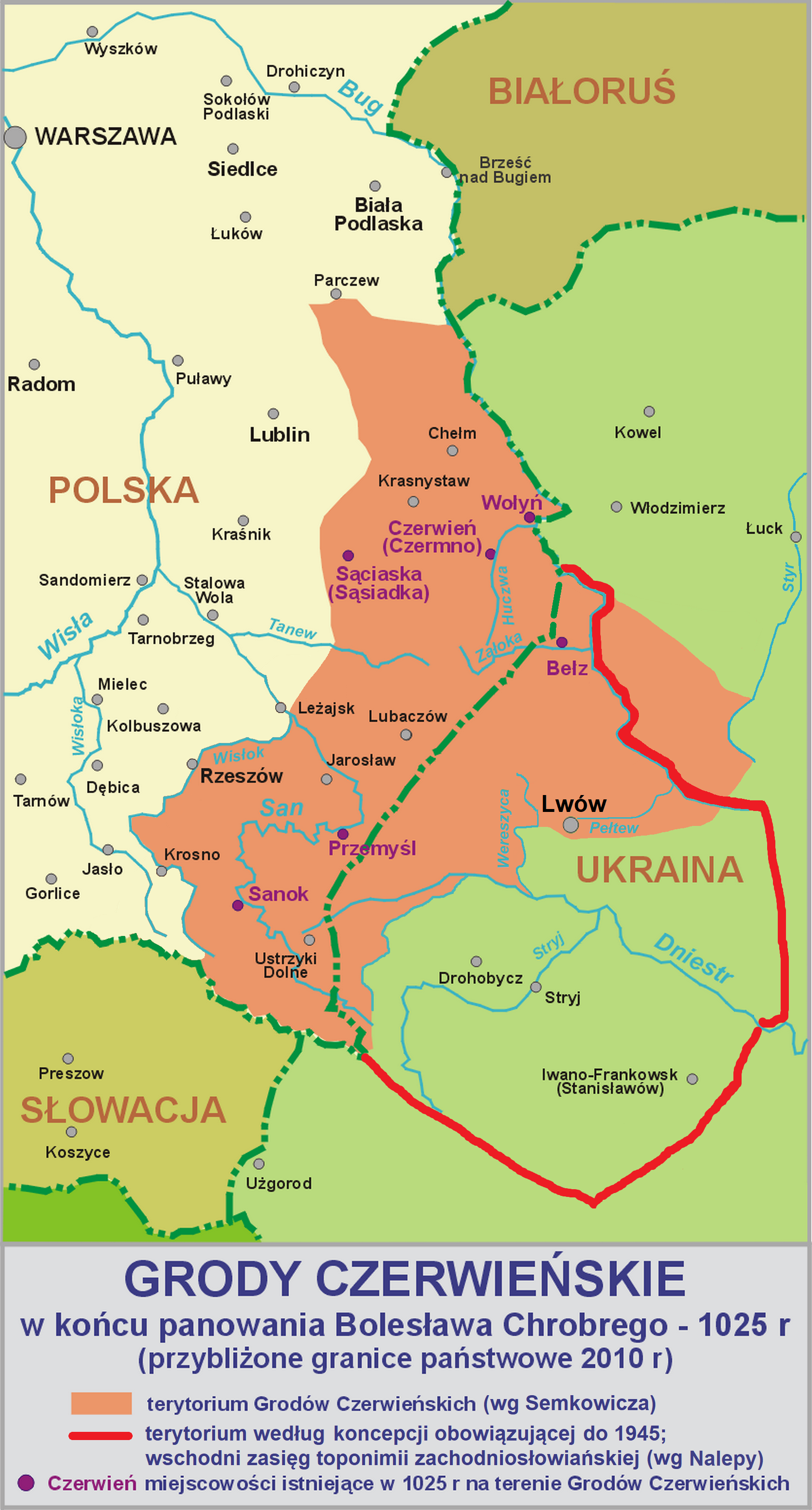 Grody Czerwieńskie w końcu panowania Bolesława Chrobrego - 1025 r na tle granic państwowych 2010 r